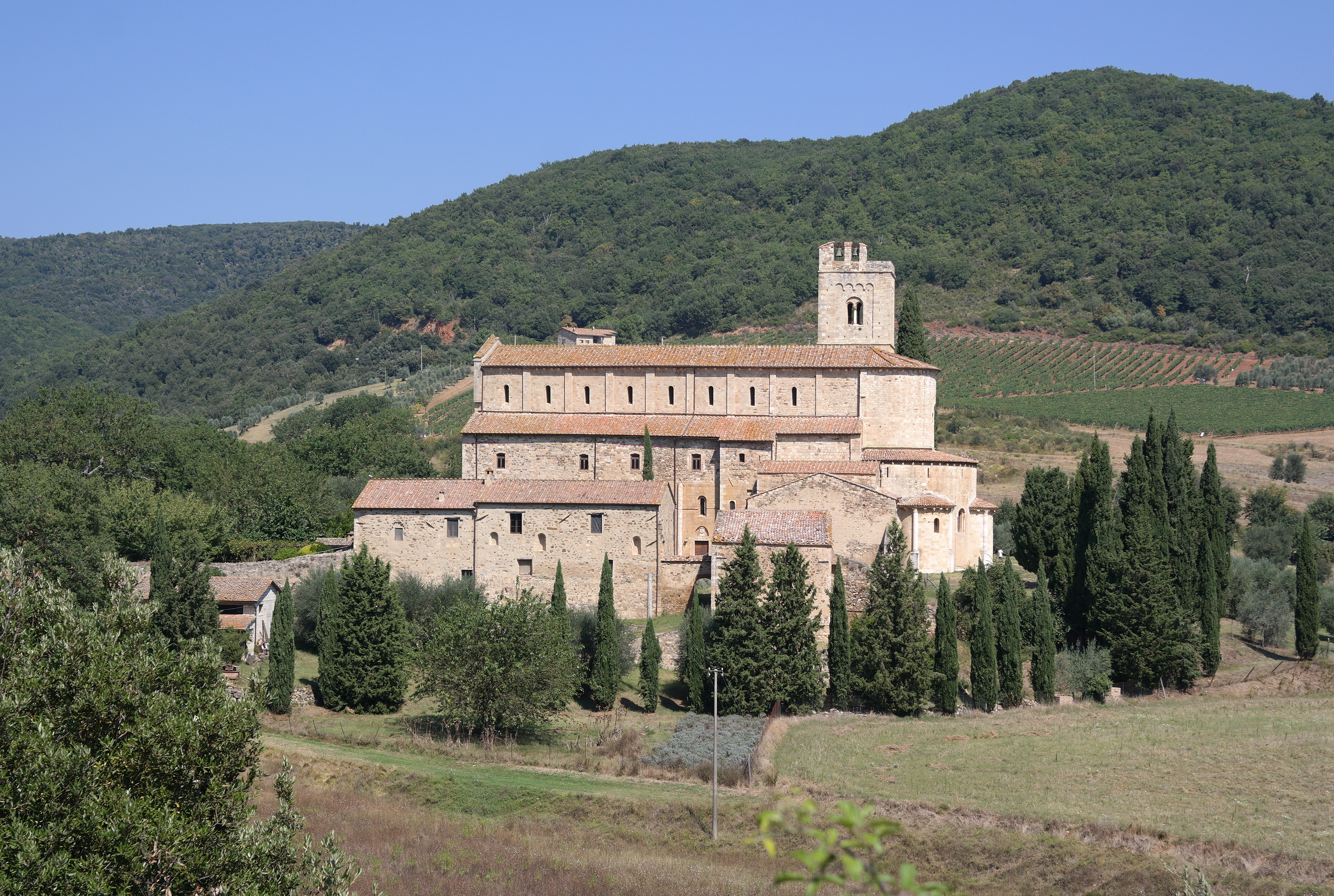 Esterno dell'Abbazia di Sant'Antimo a Montalcino